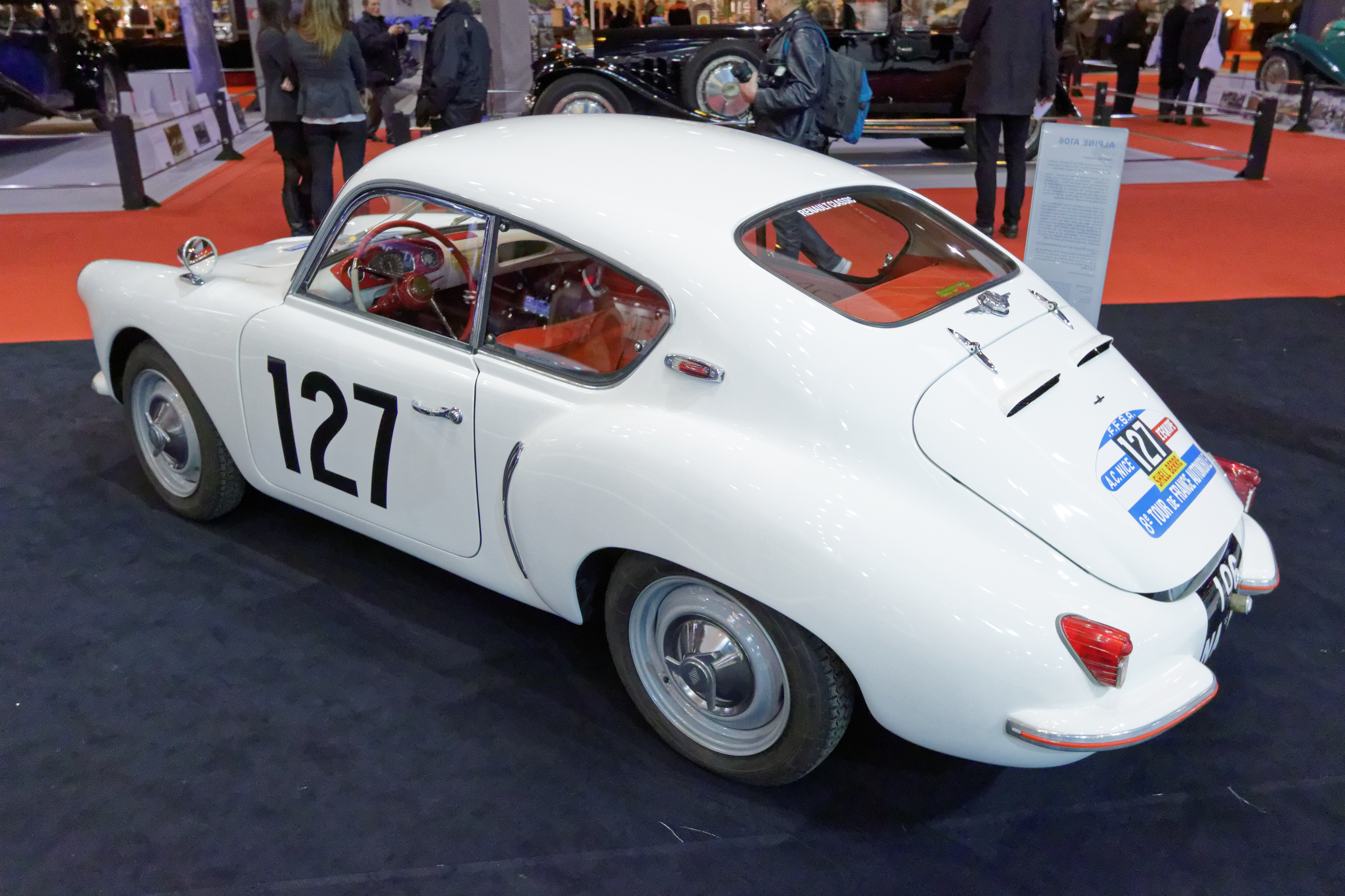 Une des voiture présentée lors du salon Rétromobile de Paris 2015